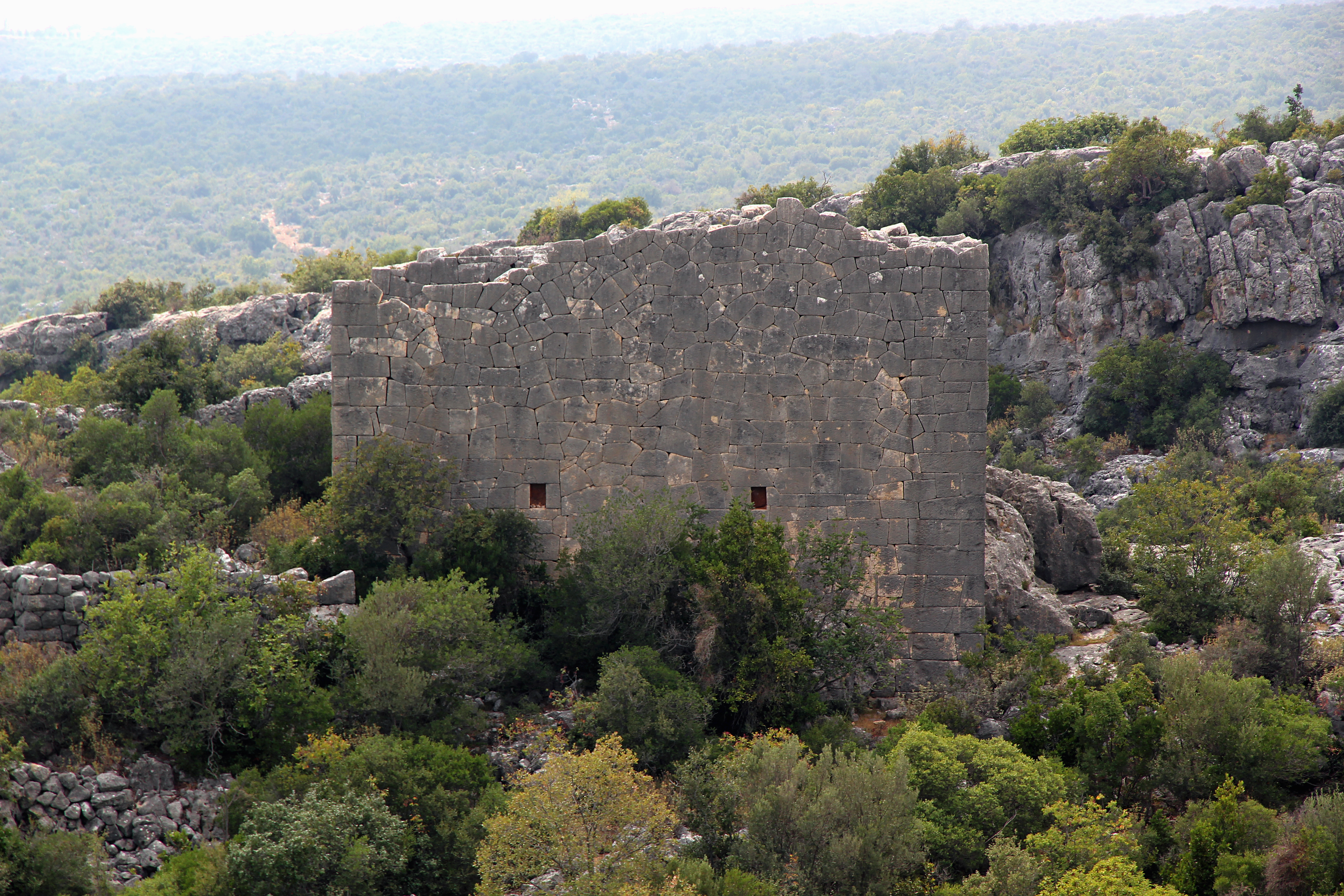 Çatıören, römische Siedlung nahe Kızkalesi, Südtürkei, Hermestempel von Nordosten